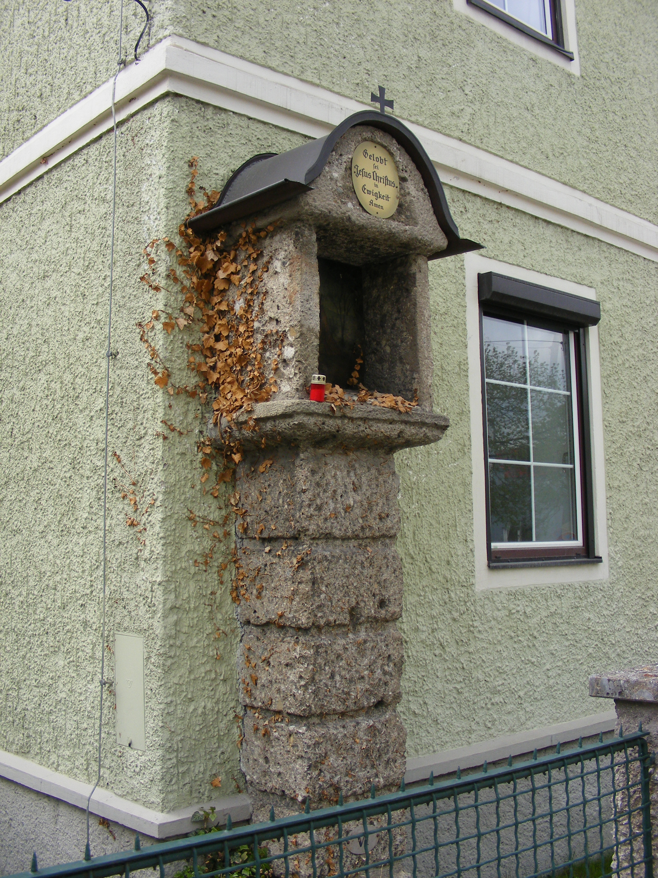 Bildstock VI der 15 Geheimnissäulen auf dem Weg nach Maria Plain, Salzburg, Österreich